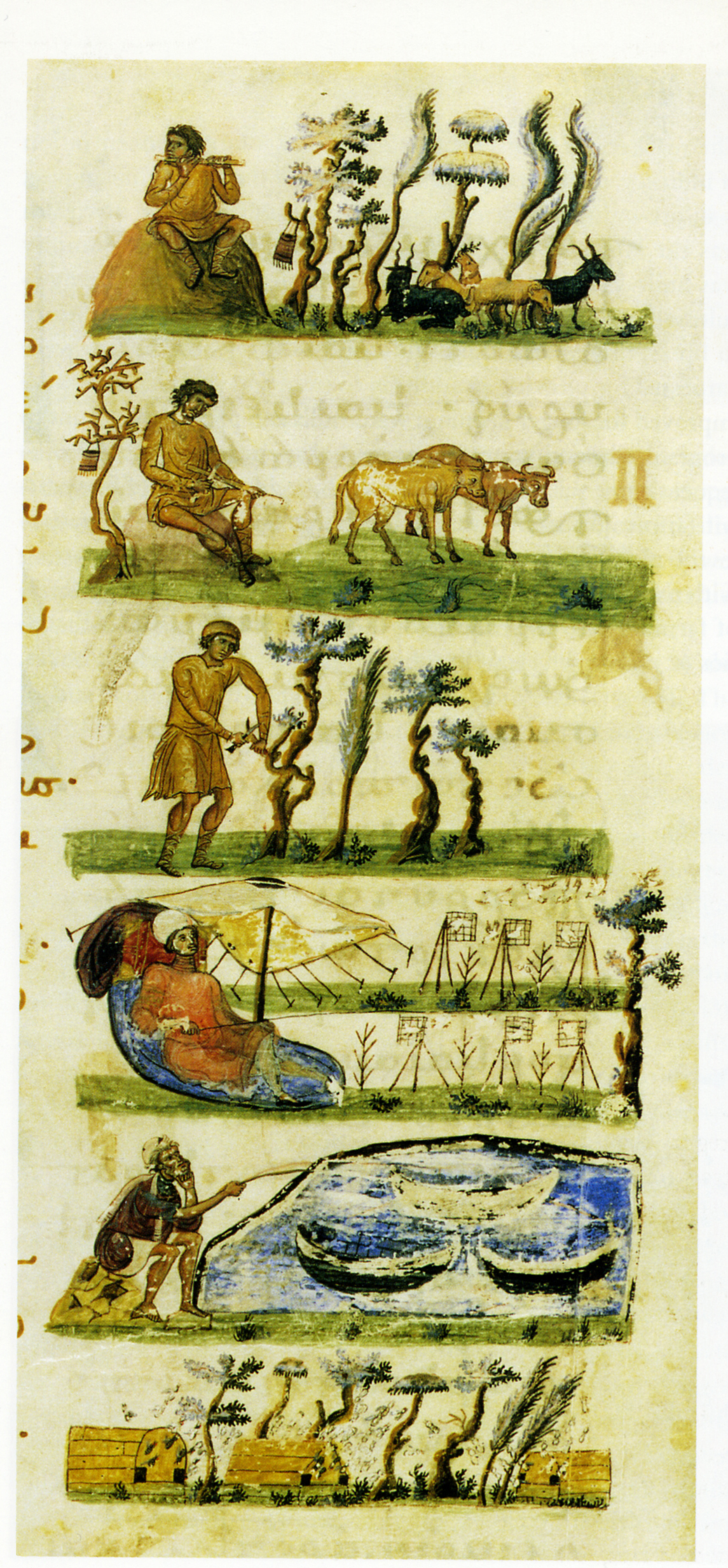 Сельские занятия весной. Гомилии Григория Назианзина. XIв. Темпера на пергаменте. (37х26,5) Национальная библиотека Франции. Париж.